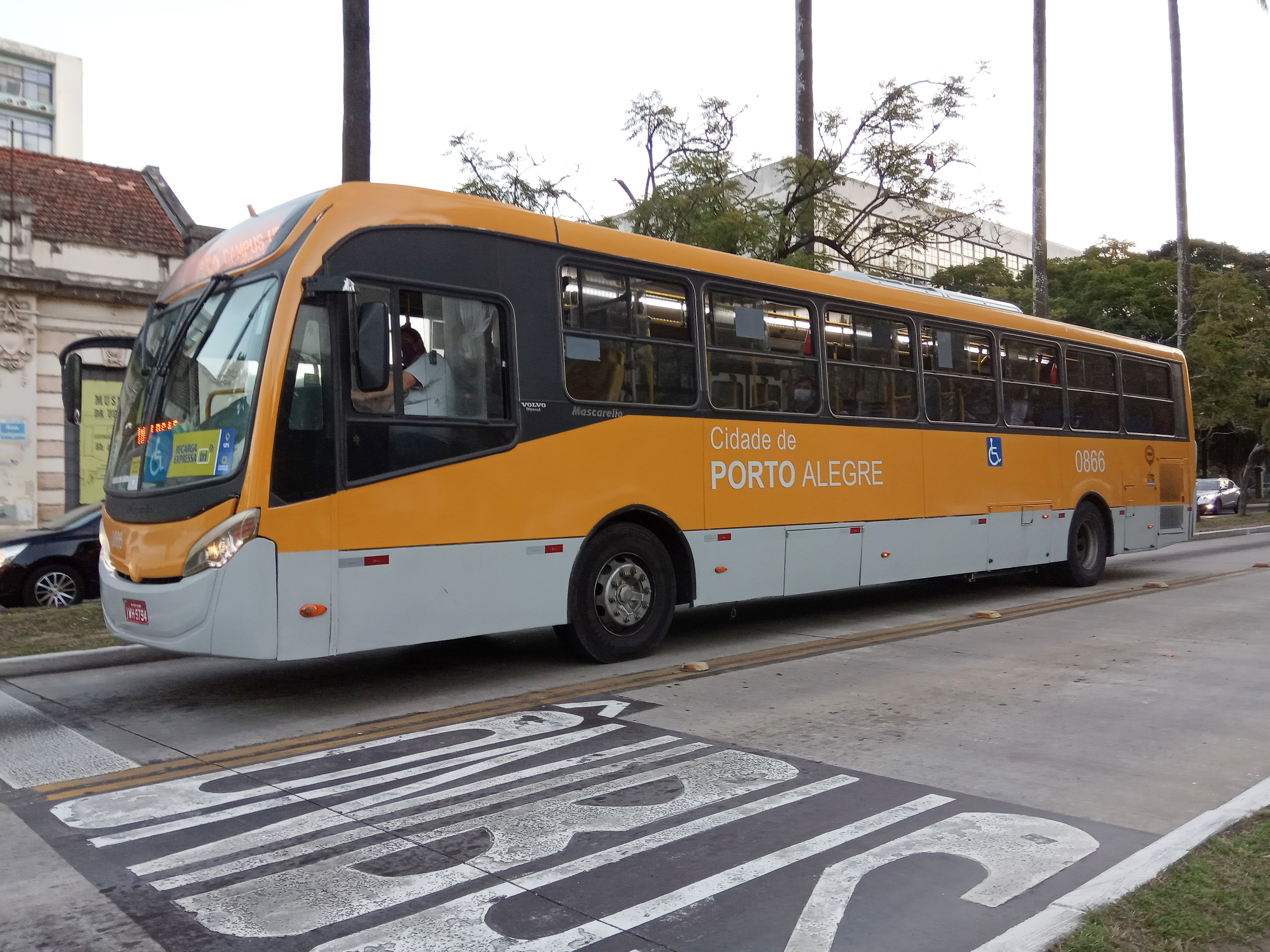 Ônibus adquirido em 2014 recebeu nova pintura em 2020.